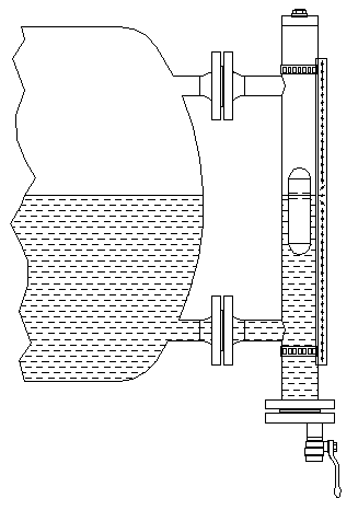 Geeft weer hoe een magnetisch peiltoestel werkt. Tekening zelf gemaakt